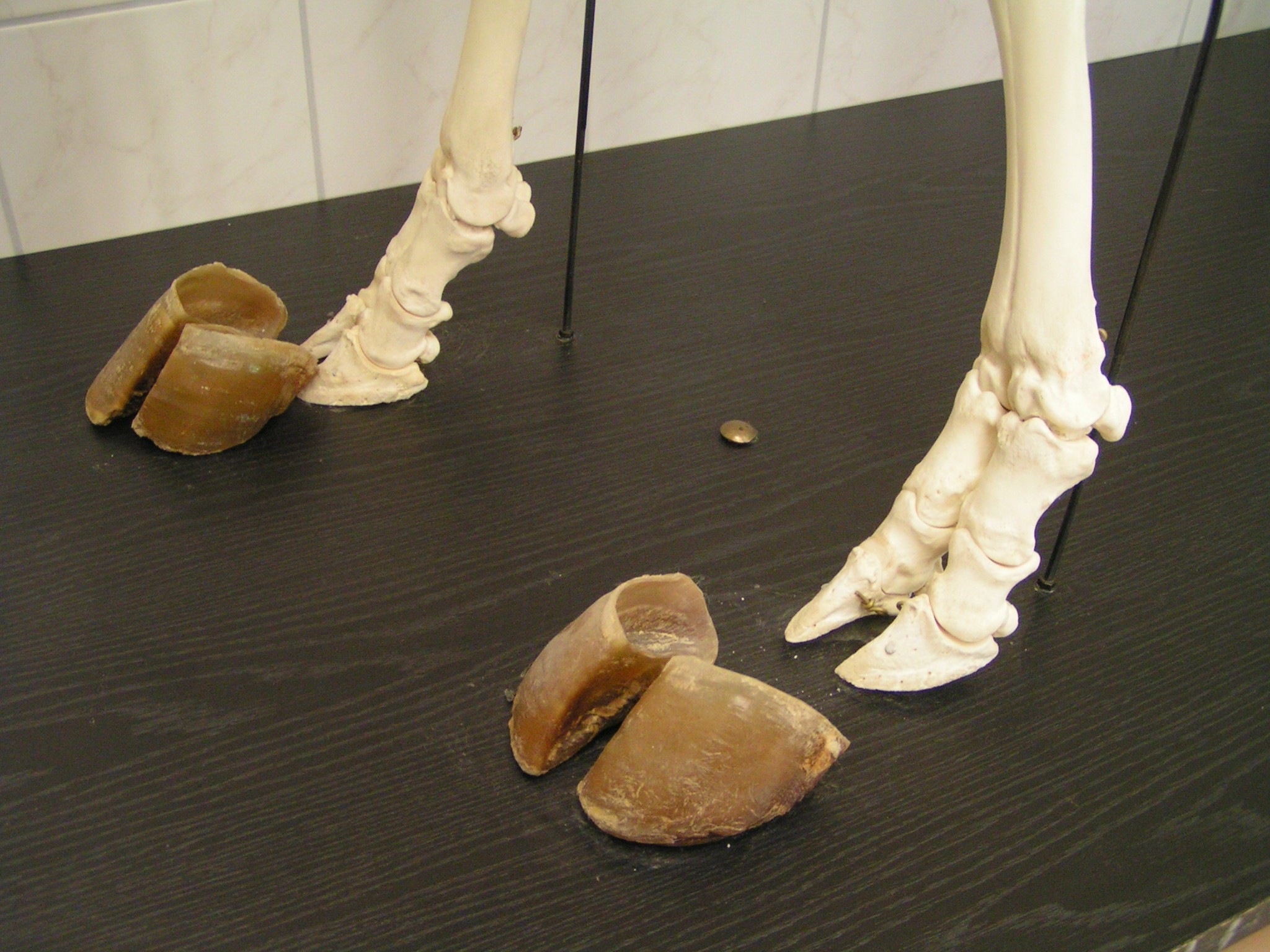 Klauen eines Rinderskeletts, Vorderbeine, Dresden Roßthal, Schulfest 2010